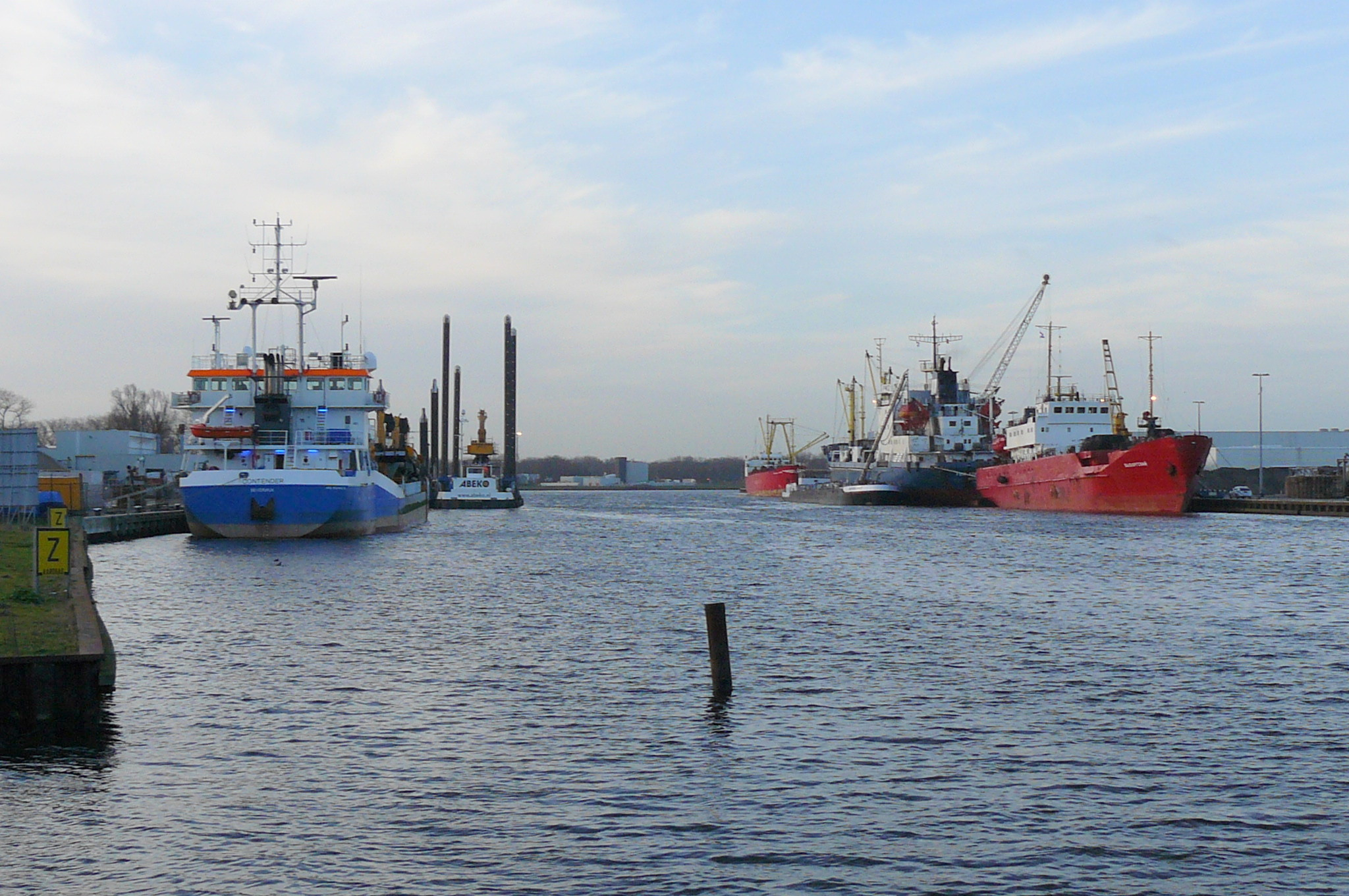 Zijkanaal A. De foto is naar het zuiden genomen en aan het eind bereikt het zijkanaal het Noordzeekanaal.